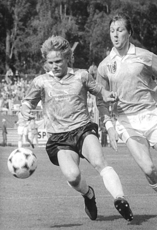 ADN-Kasper-26.5.90-Karl-Marx-Stadt (Chemnitz)-Fußball-Oberliga Chemnitzer FC - 1. FC Magdeburg Zweikampf zwischen dem Magdeburger Minkwitz und dem Chemnitzer Spranger (r.). Bei Spielende hatten die Lokalmatadoren mit 1:0 die Nase vorn.